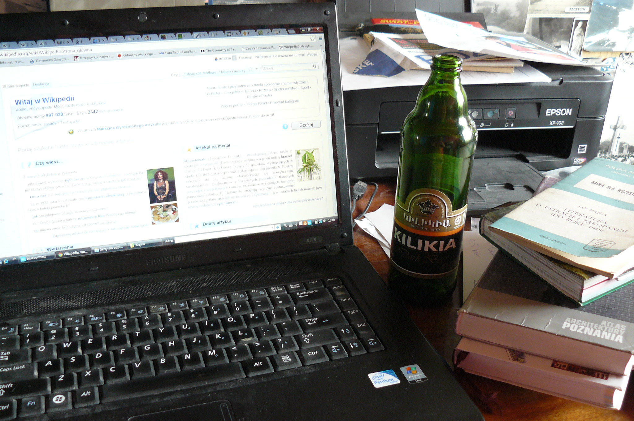 Warsztat wikipedysty...